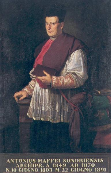 Notizie storico-critiche: Antonio Maffei è figura di grande rilievo nella cultura valtellinese dell'Ottocento: oltre a reggere l'arcipretura, si dedicò ad una intensa attività di studioso. Ebbe un ruolo importante nell'istituzione del Comitato per gli Studi Archeologici, di cui fu vicepresidente ed attivo promotore insieme al Caimi. Il ritratto utilizza lo schema della figura in piedi, presentando il sacerdote con un tono austero e una certa maestosità. Da notare l'assenza del pastorale, sostituito da un libro che il Maffei tiene in mano. Notevole, come sempre, la cura nella descrizione dei pizzi e delle pieghe. La tela assume come base il ritratto a mezzo busto, eseguito dal Caimi nel 1847.